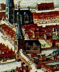 Extrai de la Carte de Liège représentant l'église Saint-Nicolas au Pont